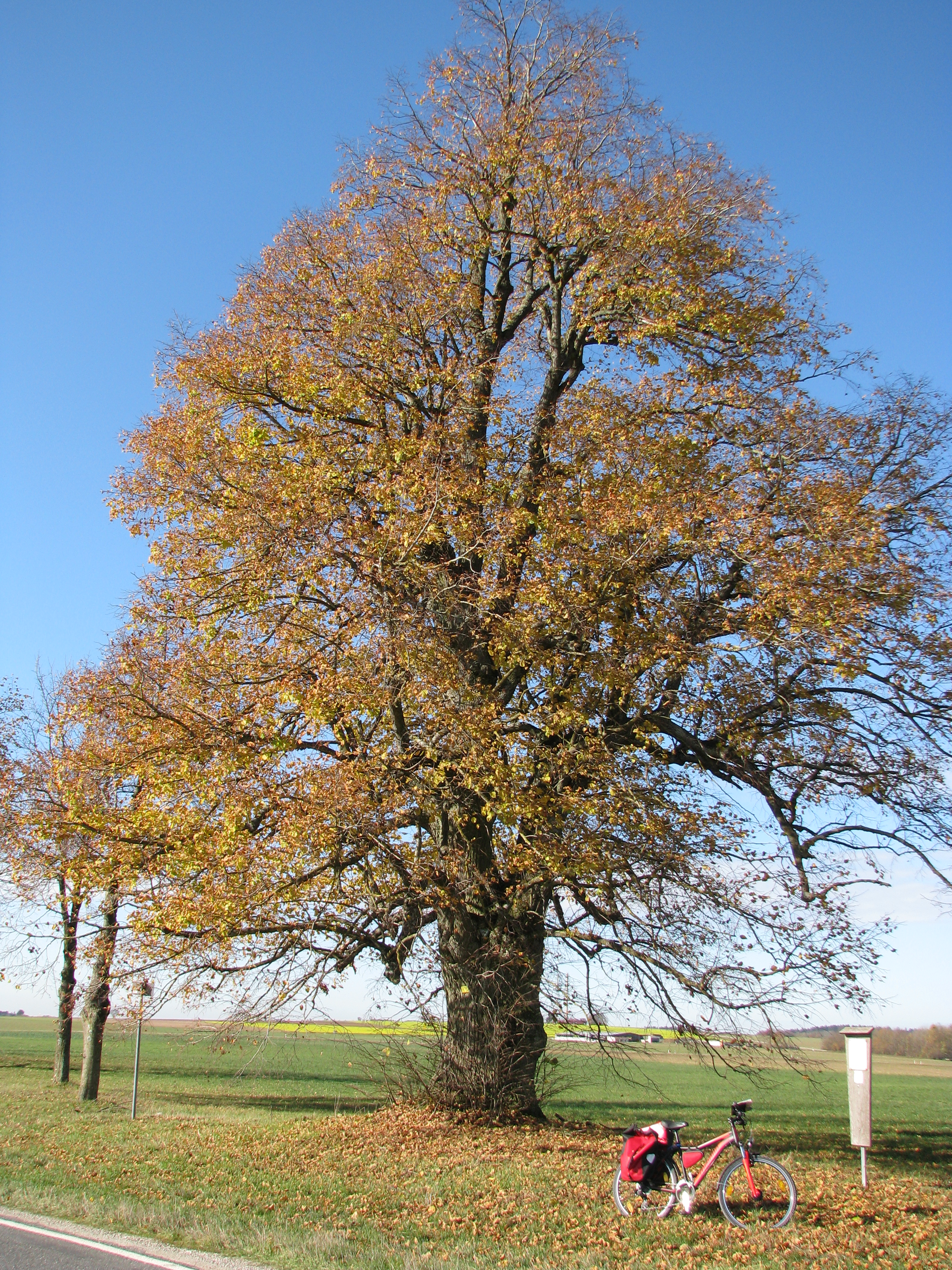 Ruppmannsburg, Ortsteil von Thalmässing im mittelfränkischen Landkreis Roth, "Hochbäumle"-Linde von 1778